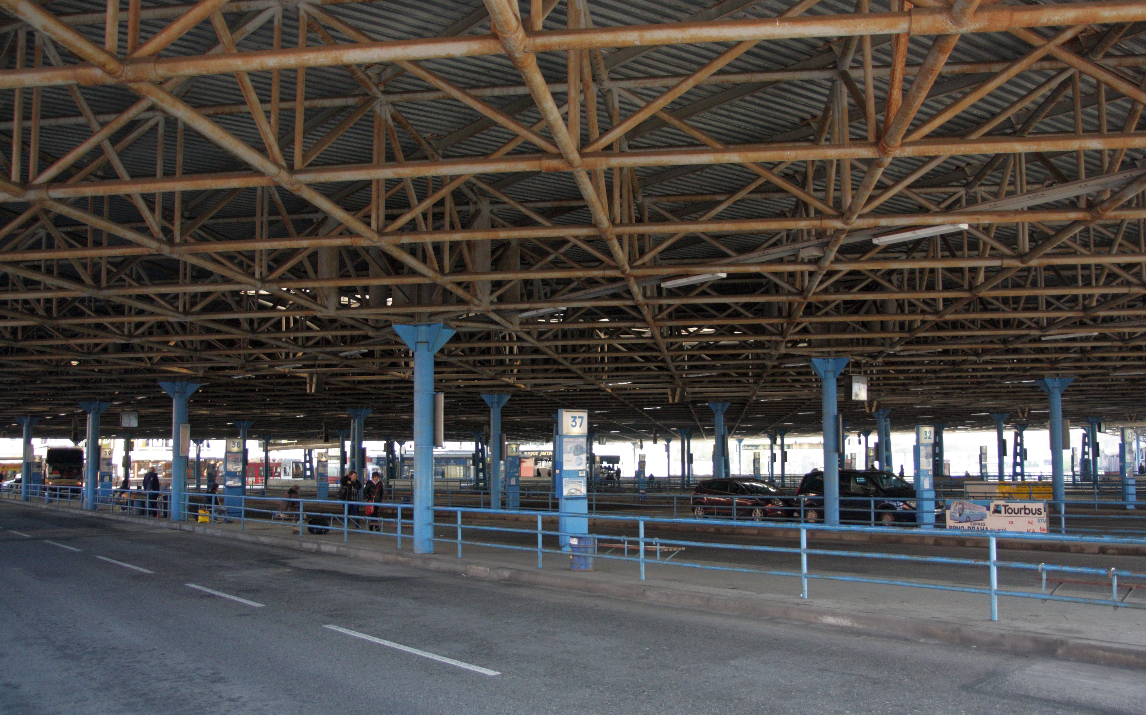 Brno - ÚAN Zvonařka, nástupiště.